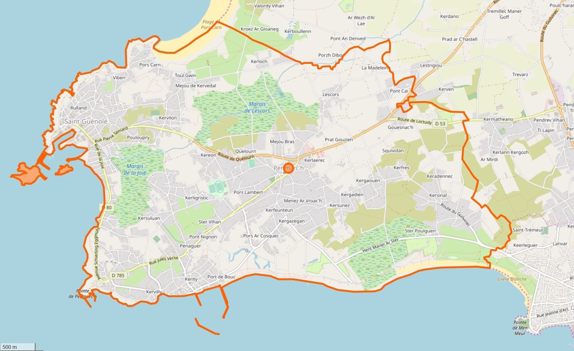 Cette carte a été créée à partir des données du projet Openstreetmap. This map may be incomplete, and may contain errors. Don't rely solely on it for navigation.